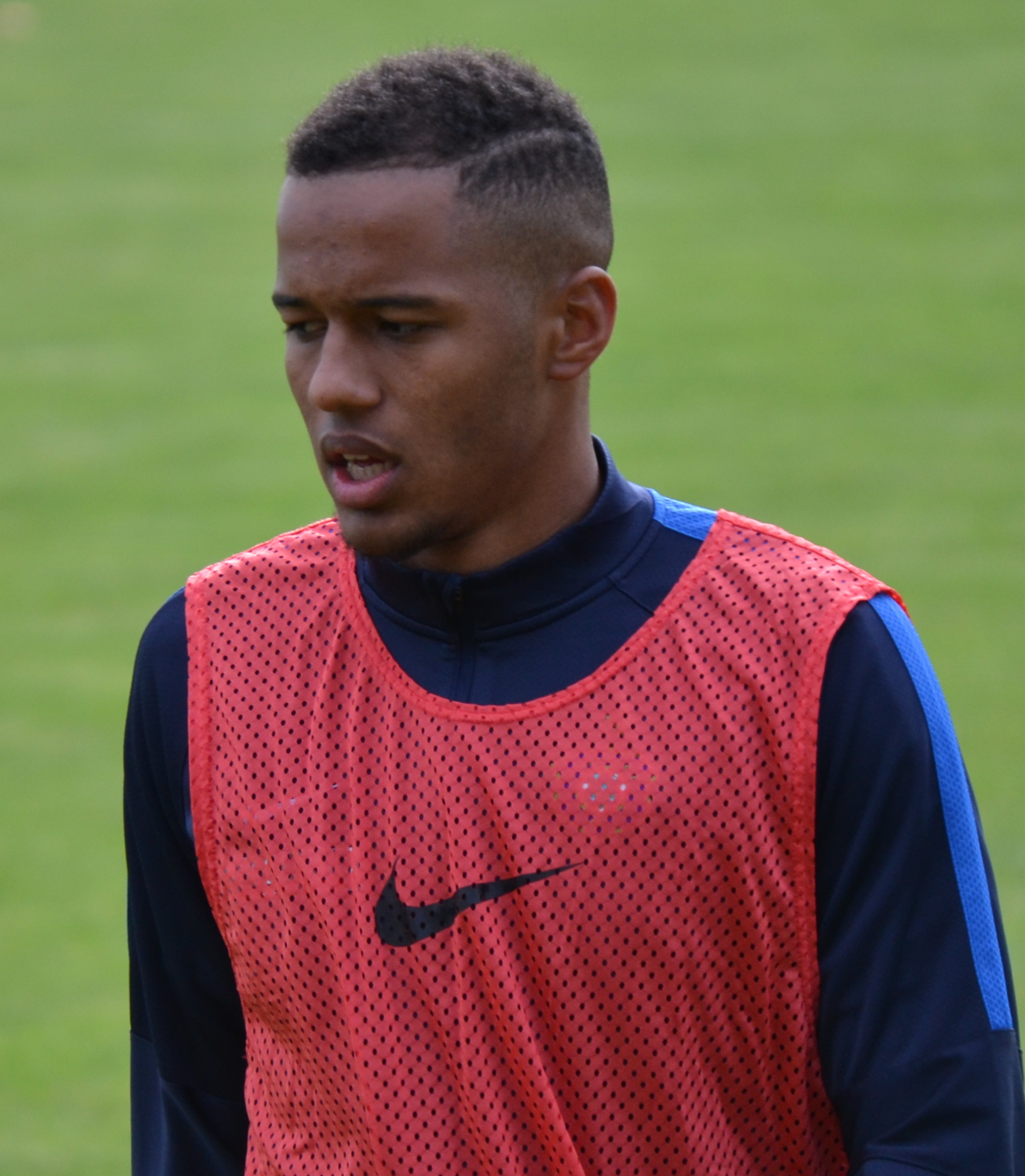 Louis Samson beim Aufwärmen vor dem Freundschaftsspiel von Erzgebirge Aue gegen den HFC Colditz im Juni 2016